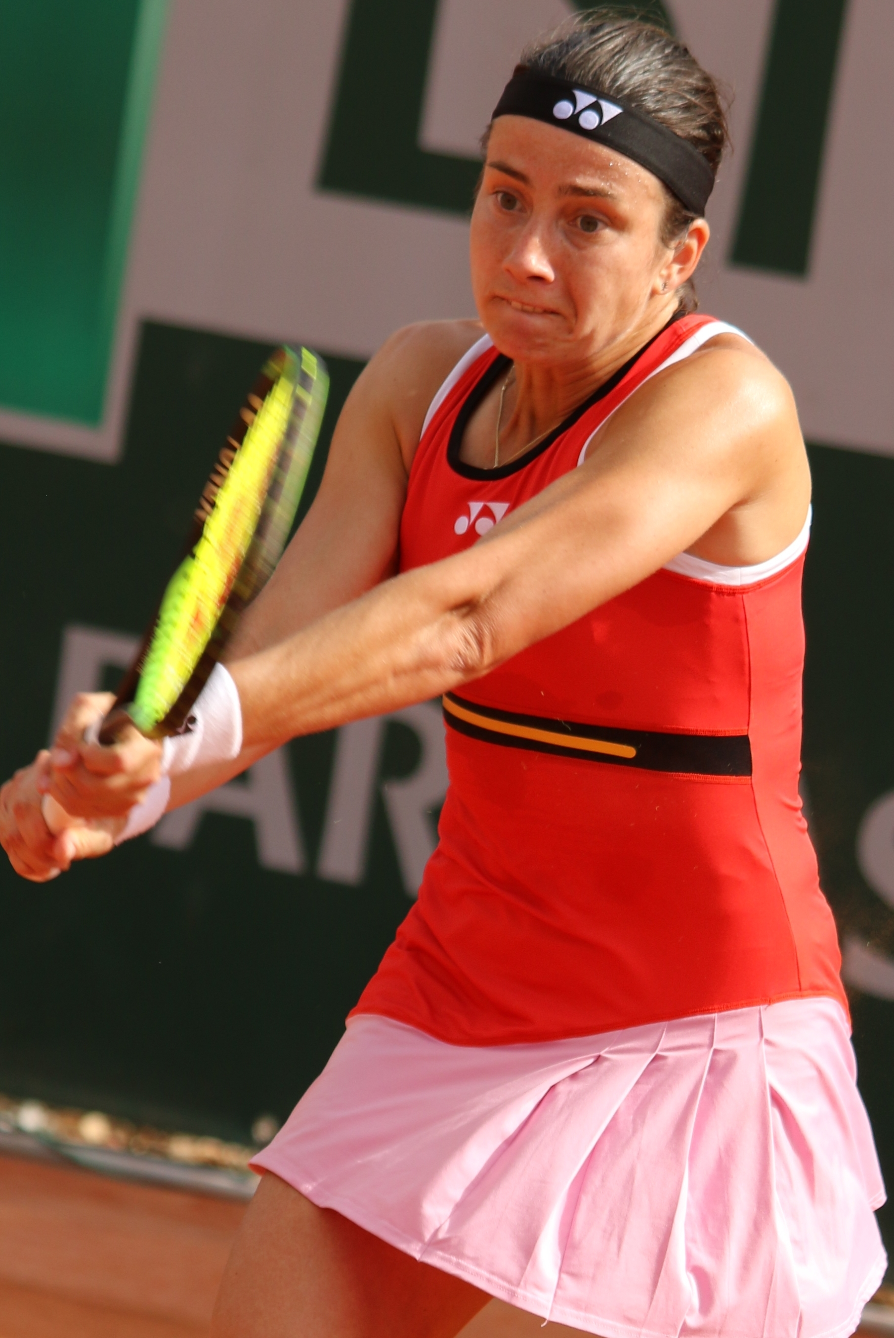 Sevastova RG19 (49)